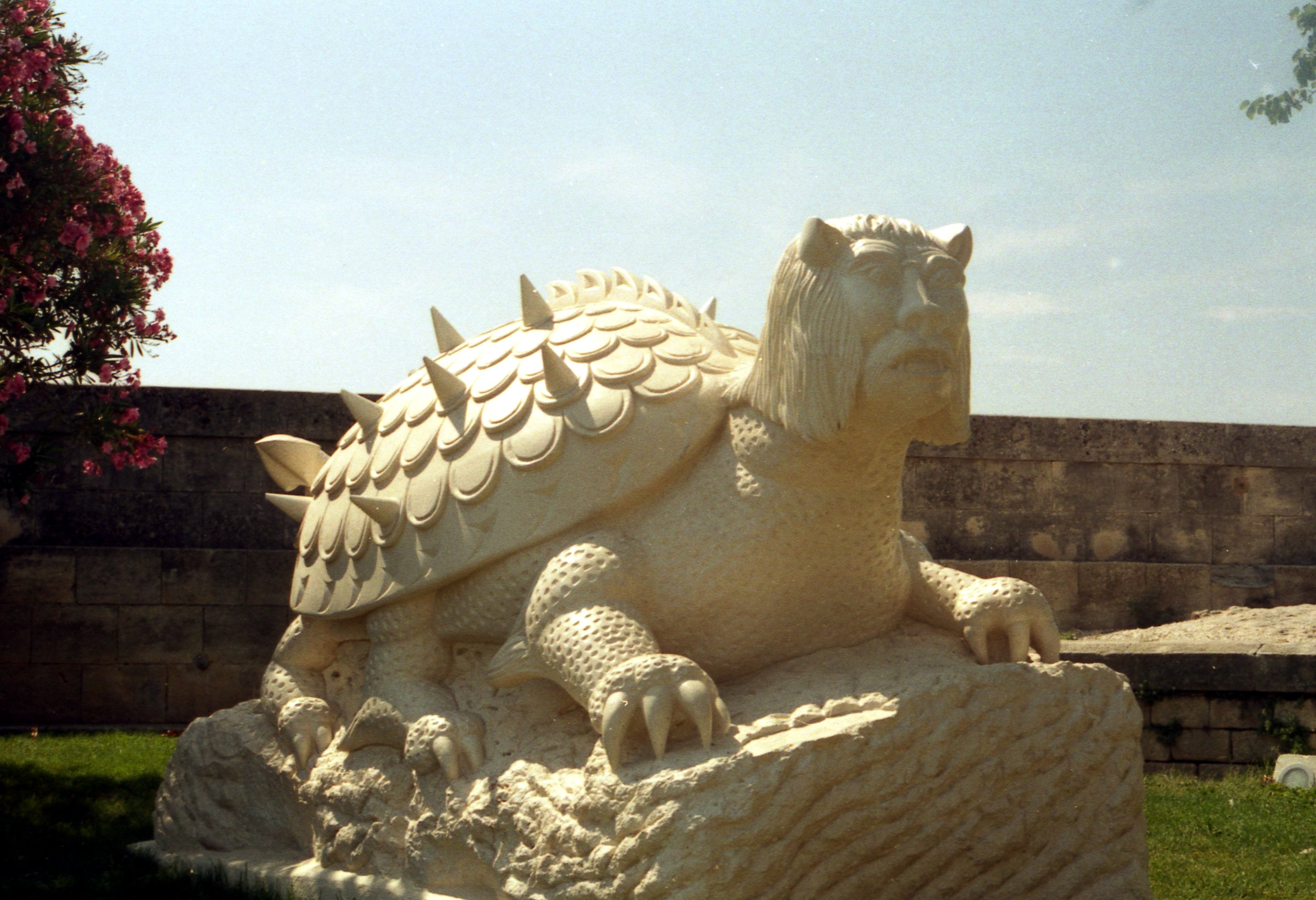 Statua del tarrasque nei pressi del castello di Tarascon